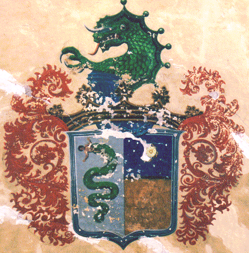 stemma della famiglia Riario Sforza affrescato sulla volta d'ingresso del palazzo Riario Sforza di Napoli